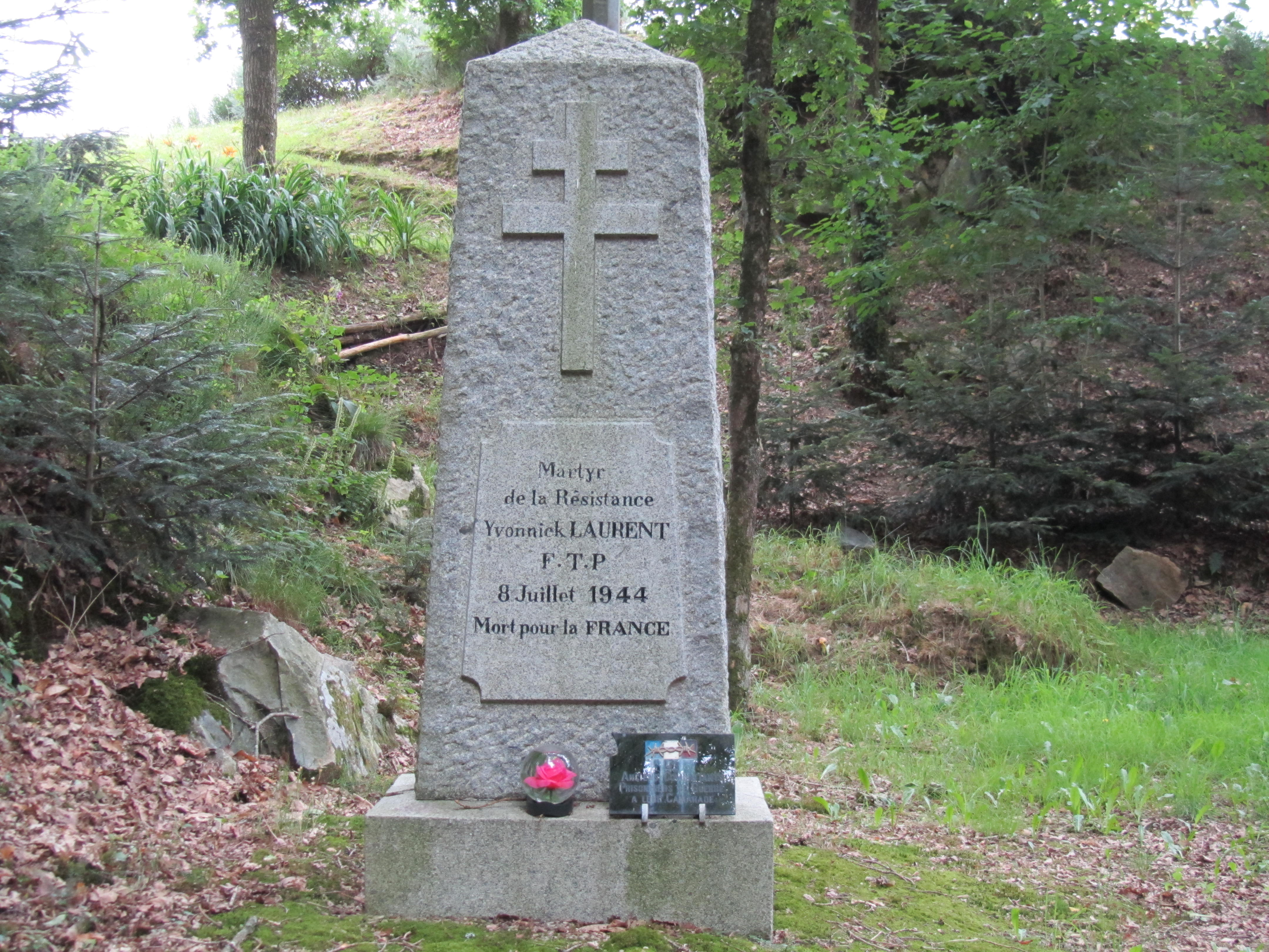 Le monument à la mémoire d'Yvonnick Laurent est érigé à La Roche au Merle à Vieux-Vy-sur-Couesnon. .